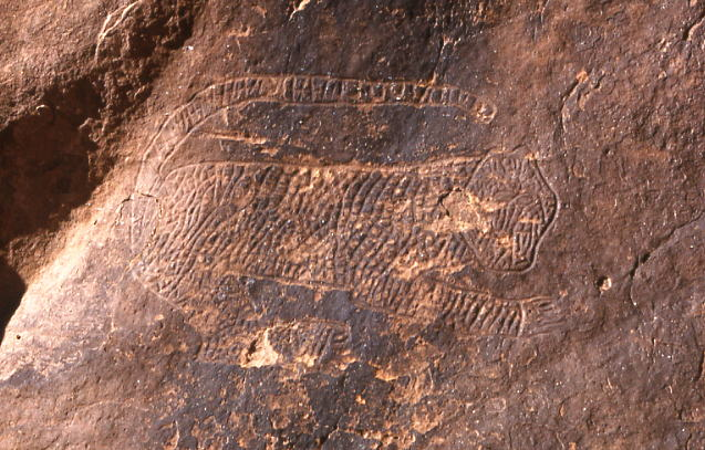 Gravures préhistoriques de la région d'El Bayadh, Algérie